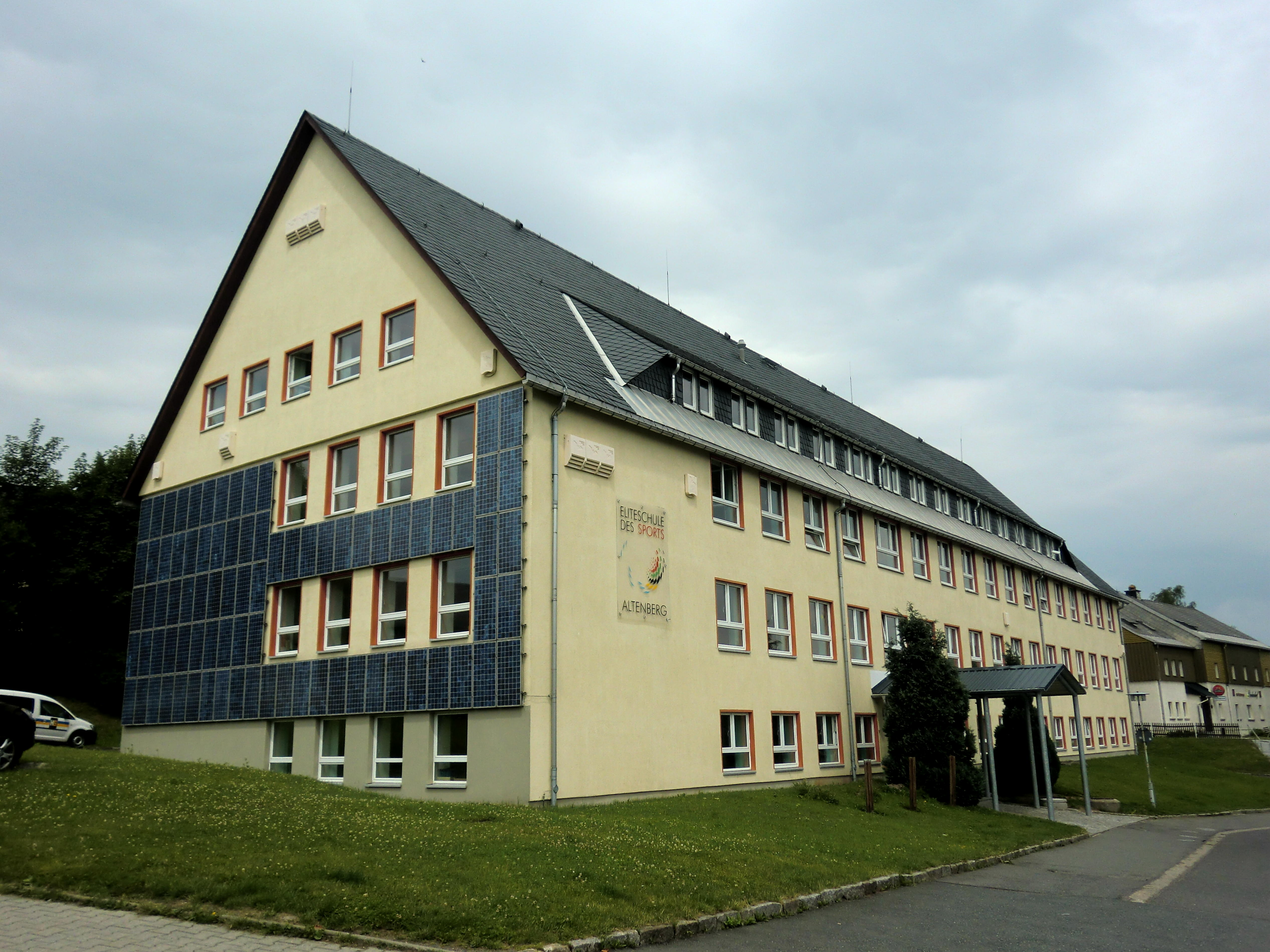 Altenberg, Glückauf-Gymnasium Außenstelle Altenberg, Schellerhauer Weg 10